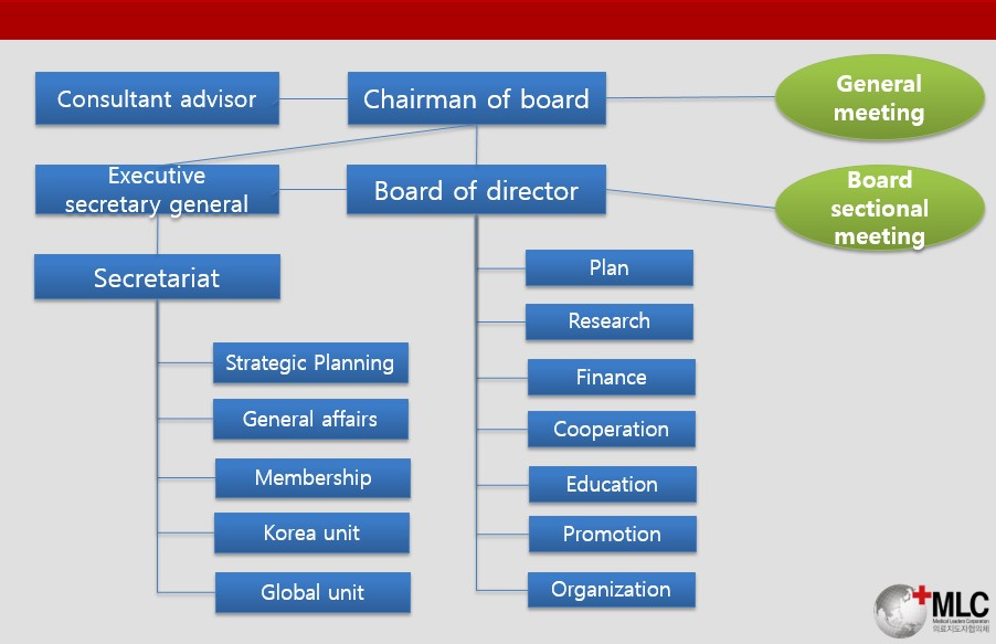 조직도